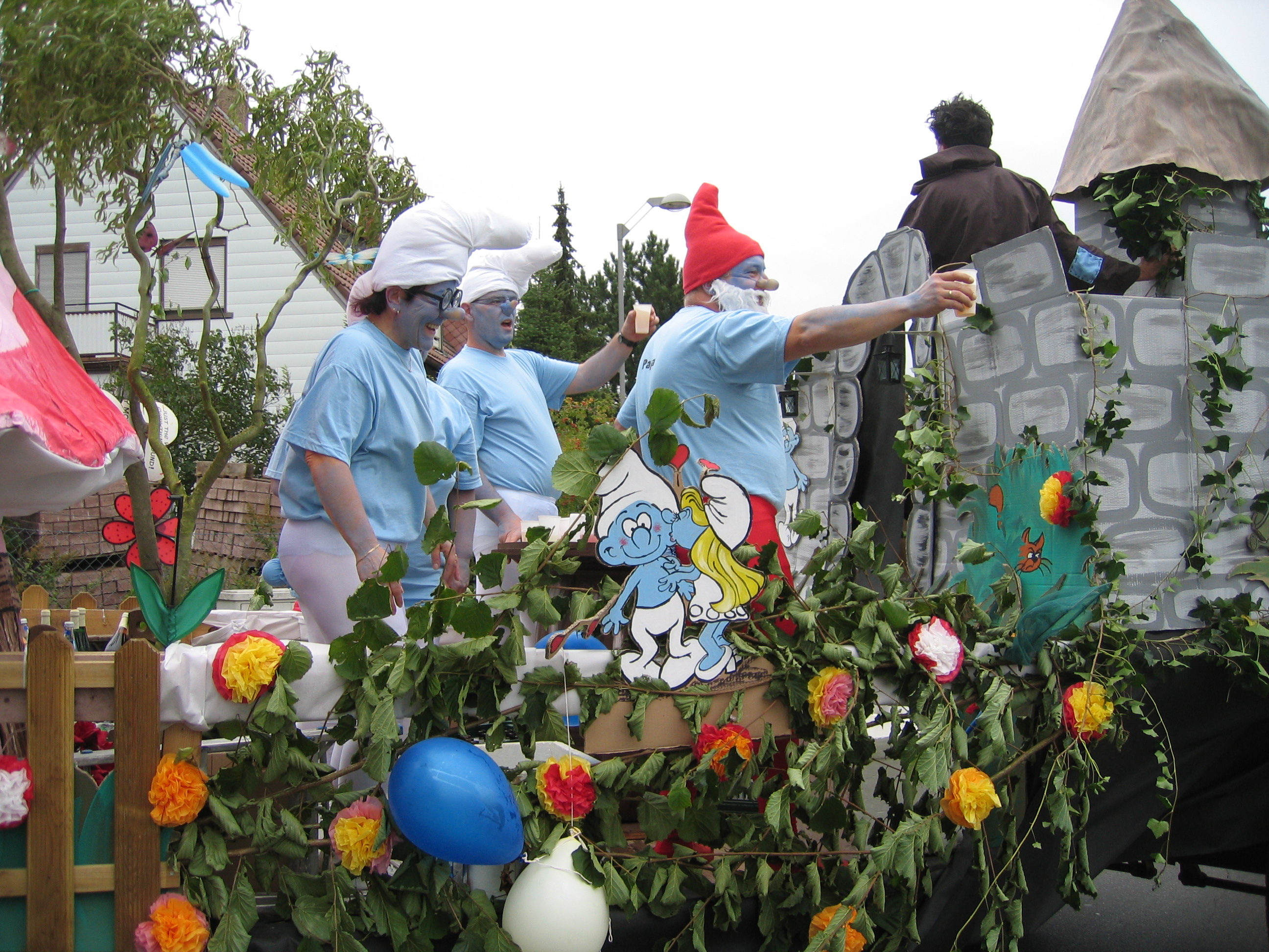 Kerwe in Alsenborn, Wagen der Gaststätte Waldesruh mit dem Motiv Schlümpfe, 03.09.2006